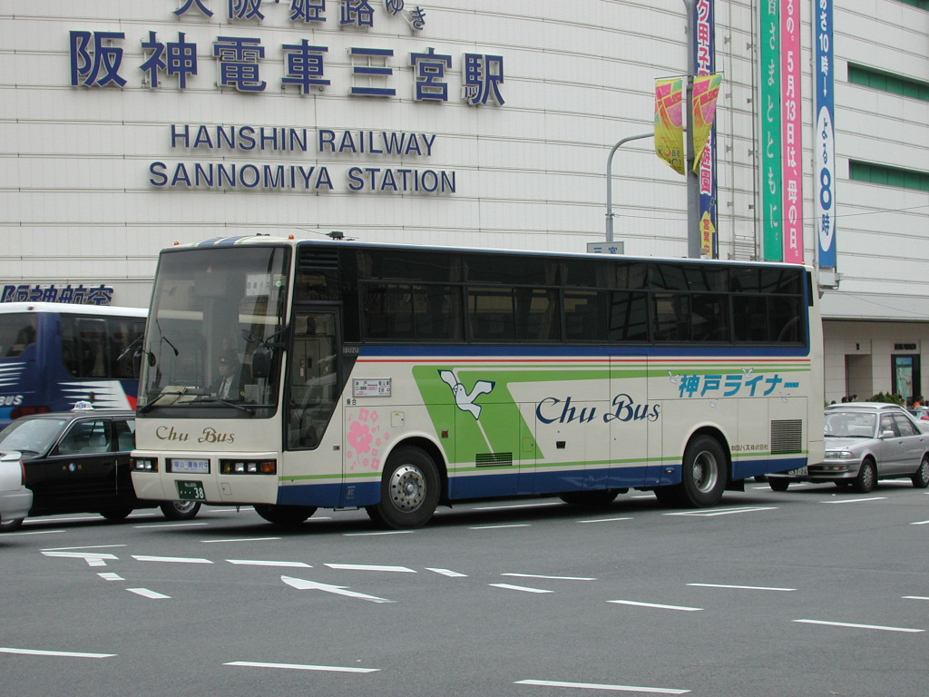 三宮付近にて 2001-4-14撮影